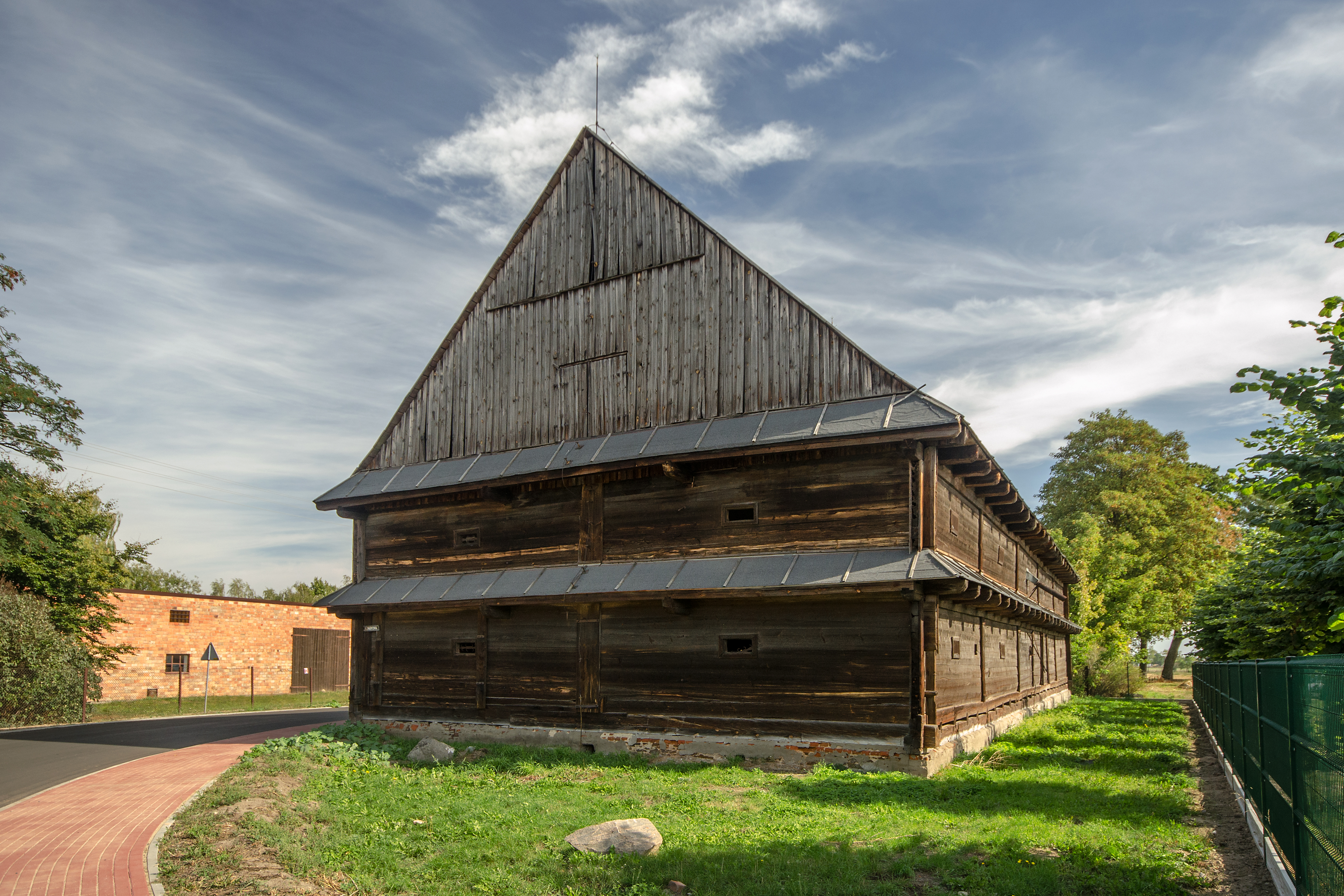 Skomlin, spichrz, 1777